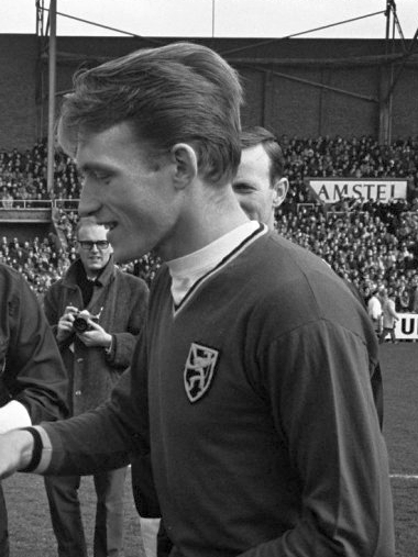 van Himst.